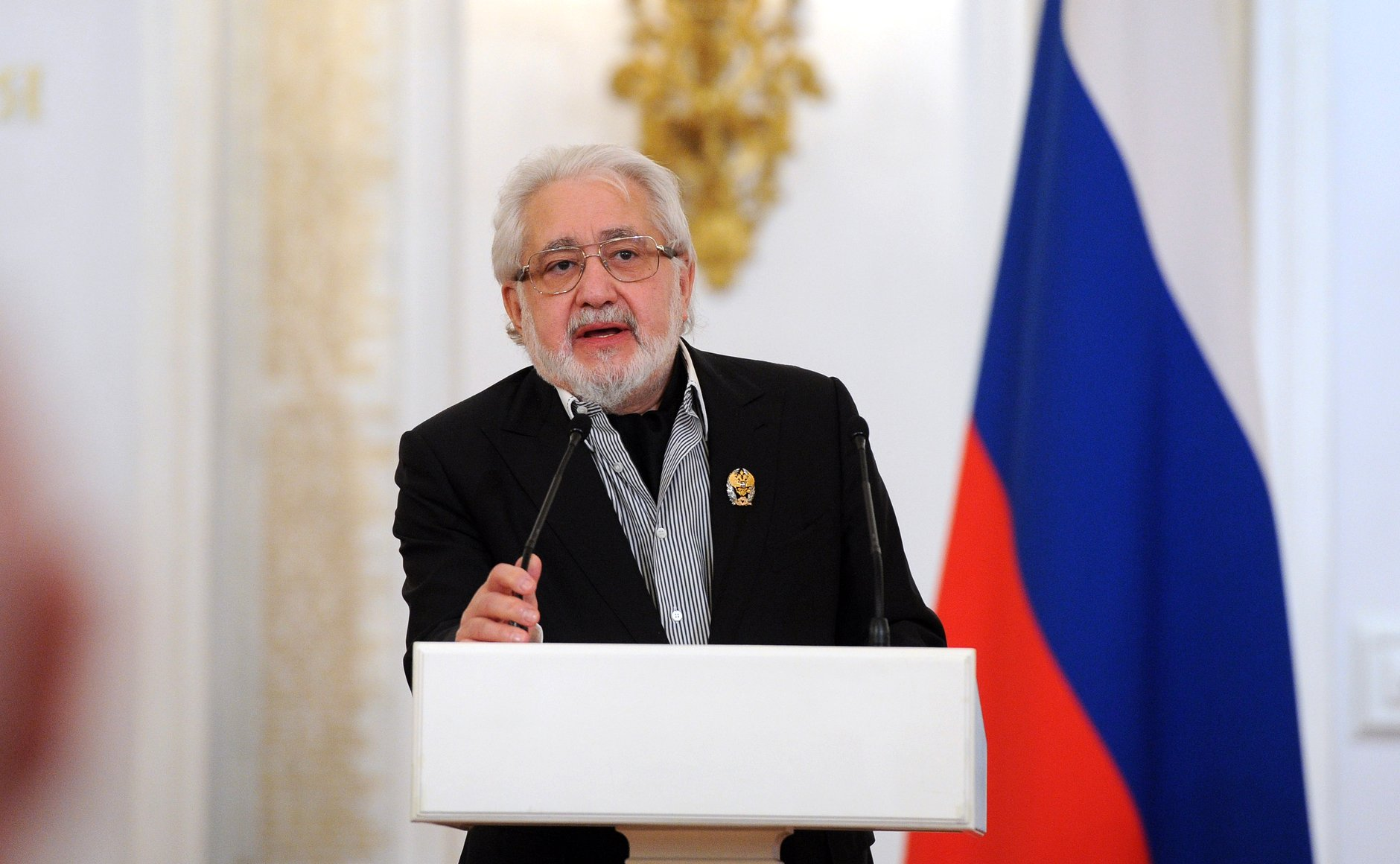 Вручение Государственных премий Российской Федерации за 2015 год. Лауреат Государственной премии в области литературы и искусства Лев Додин